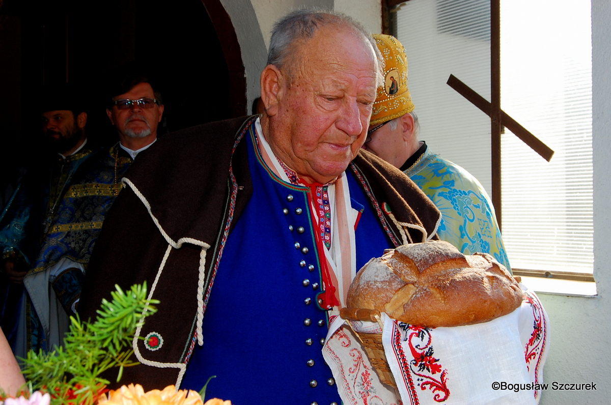 Zyndranowa, 30 sierpnia 2015 r,; Jubileusz 30. lat poświęcenia Prawosławnej Cerkwi